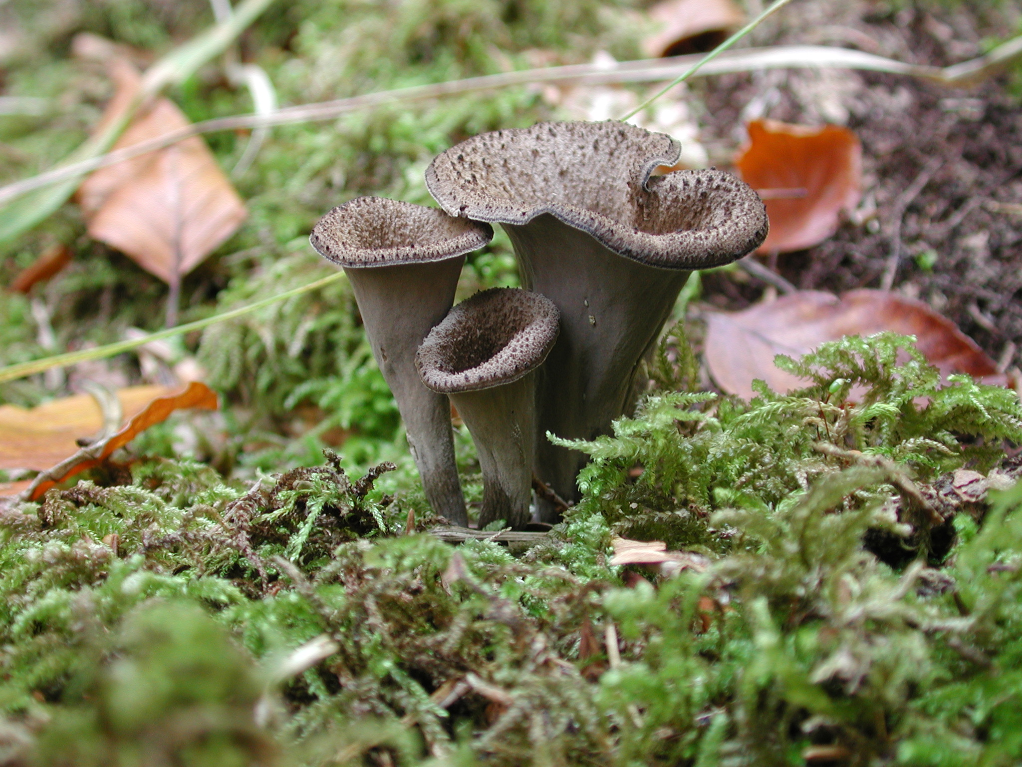 Totentrompete in der Steiermark aufgenommen am 21.10.2001 Wolfgang Wallner